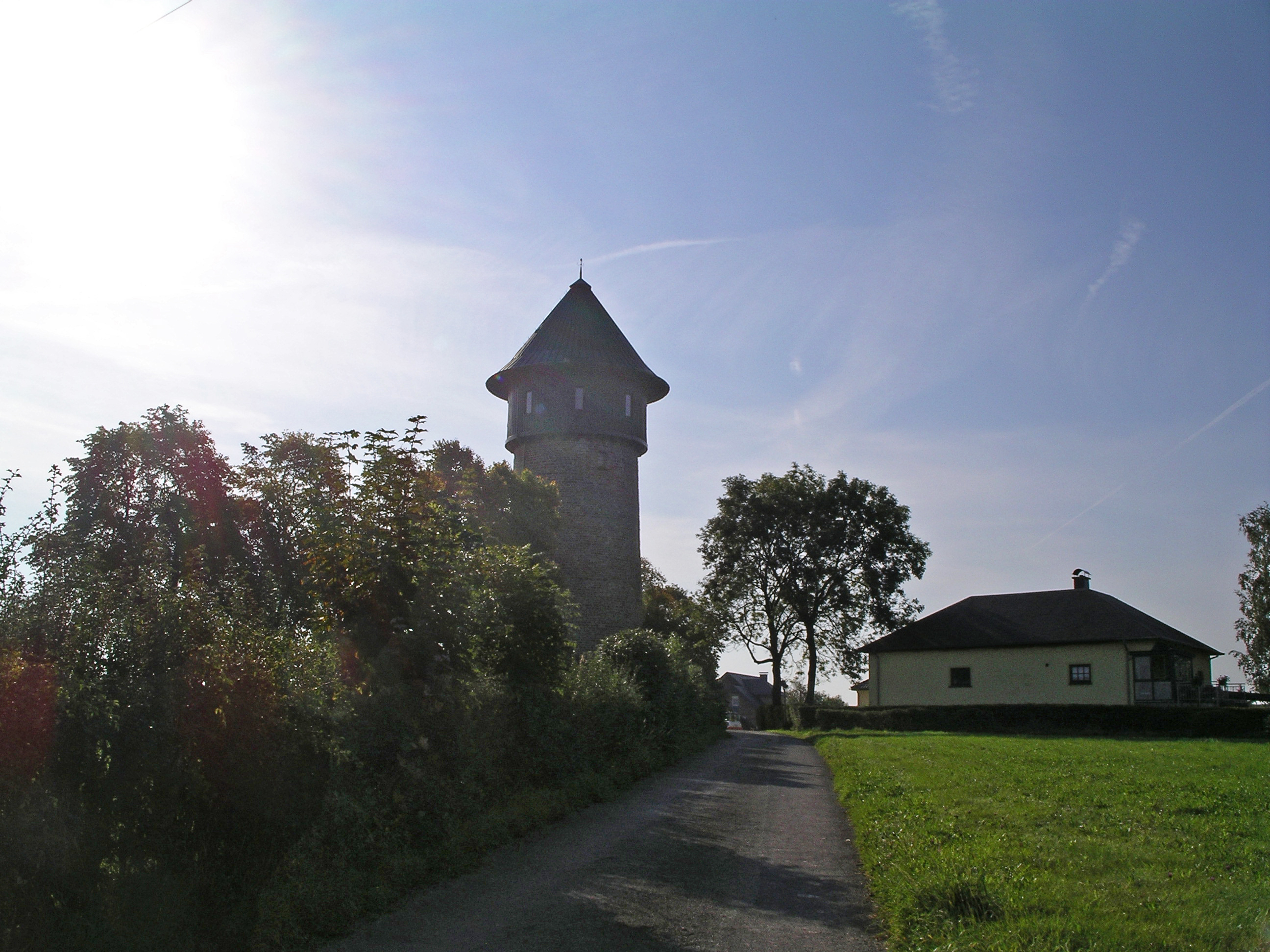 Sicht auf Wasserturm in Hosingen